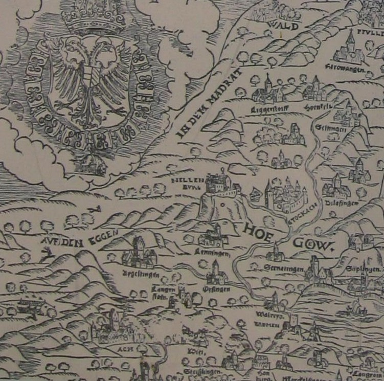 Ansicht der Nellenburg aus der Bodenseekarte des Tibianus, Ausschnitt